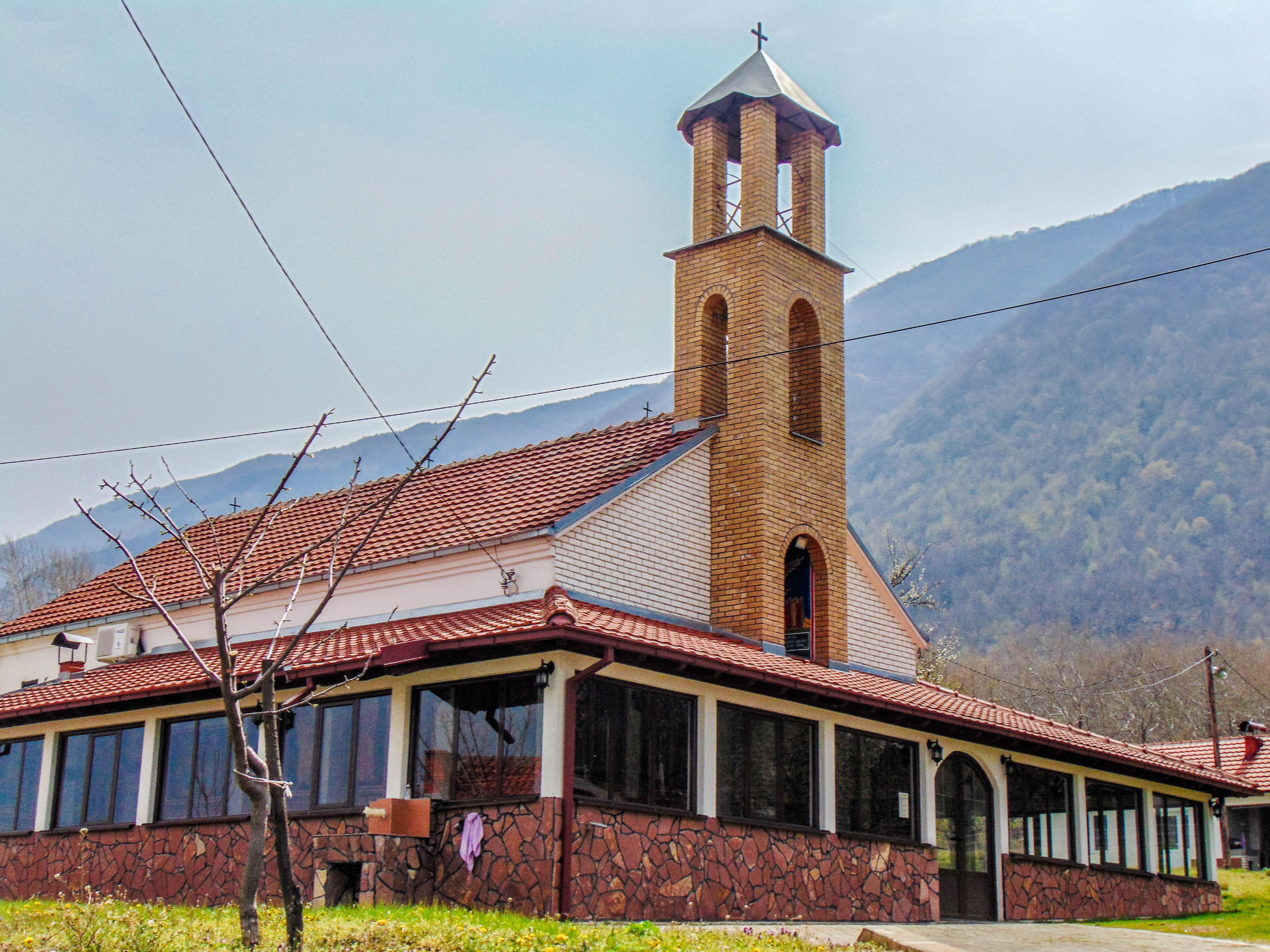 Црква „Св. Спас“ - Старо Коњарево